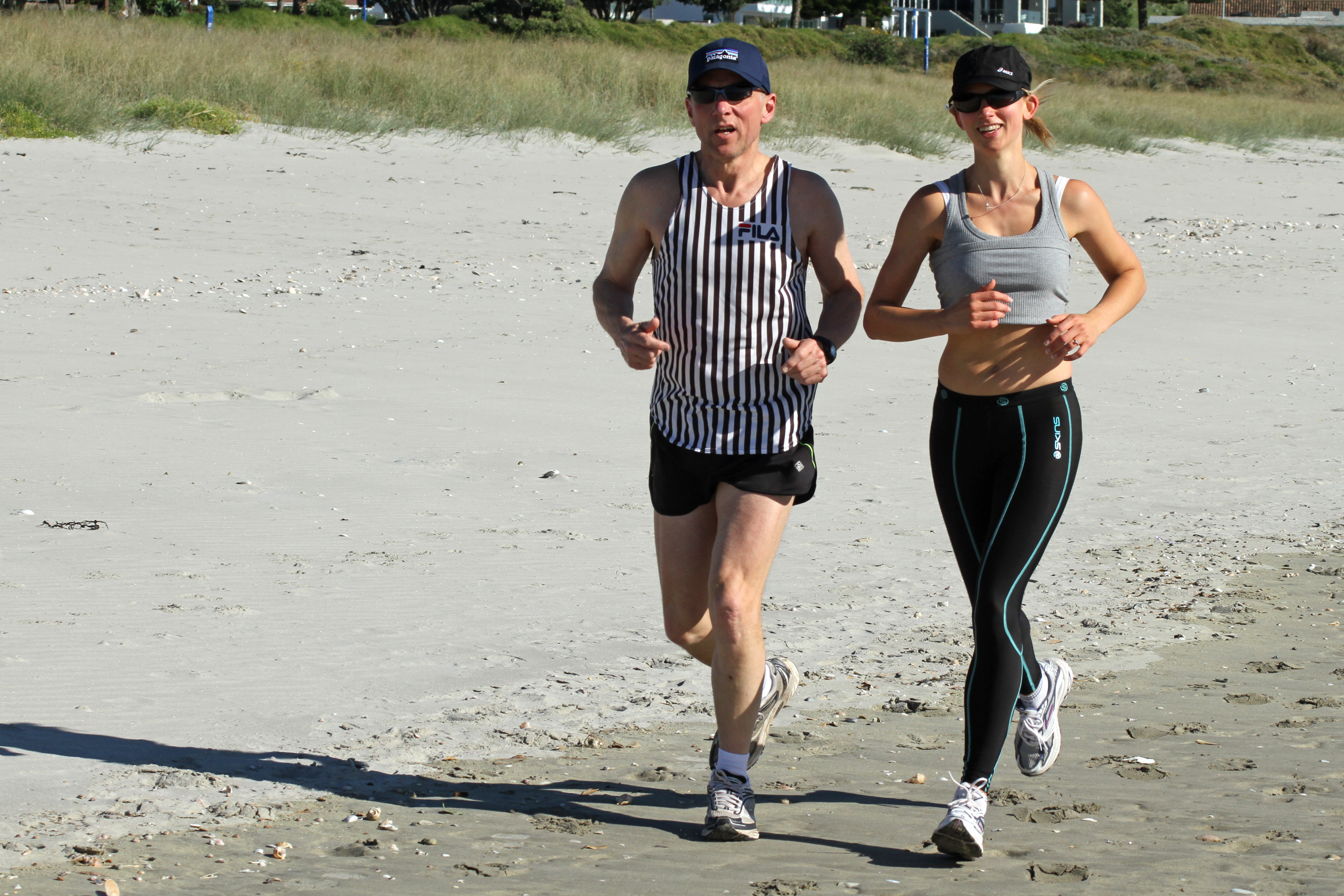 Ian and Susan jogging on Maunganui beach 3